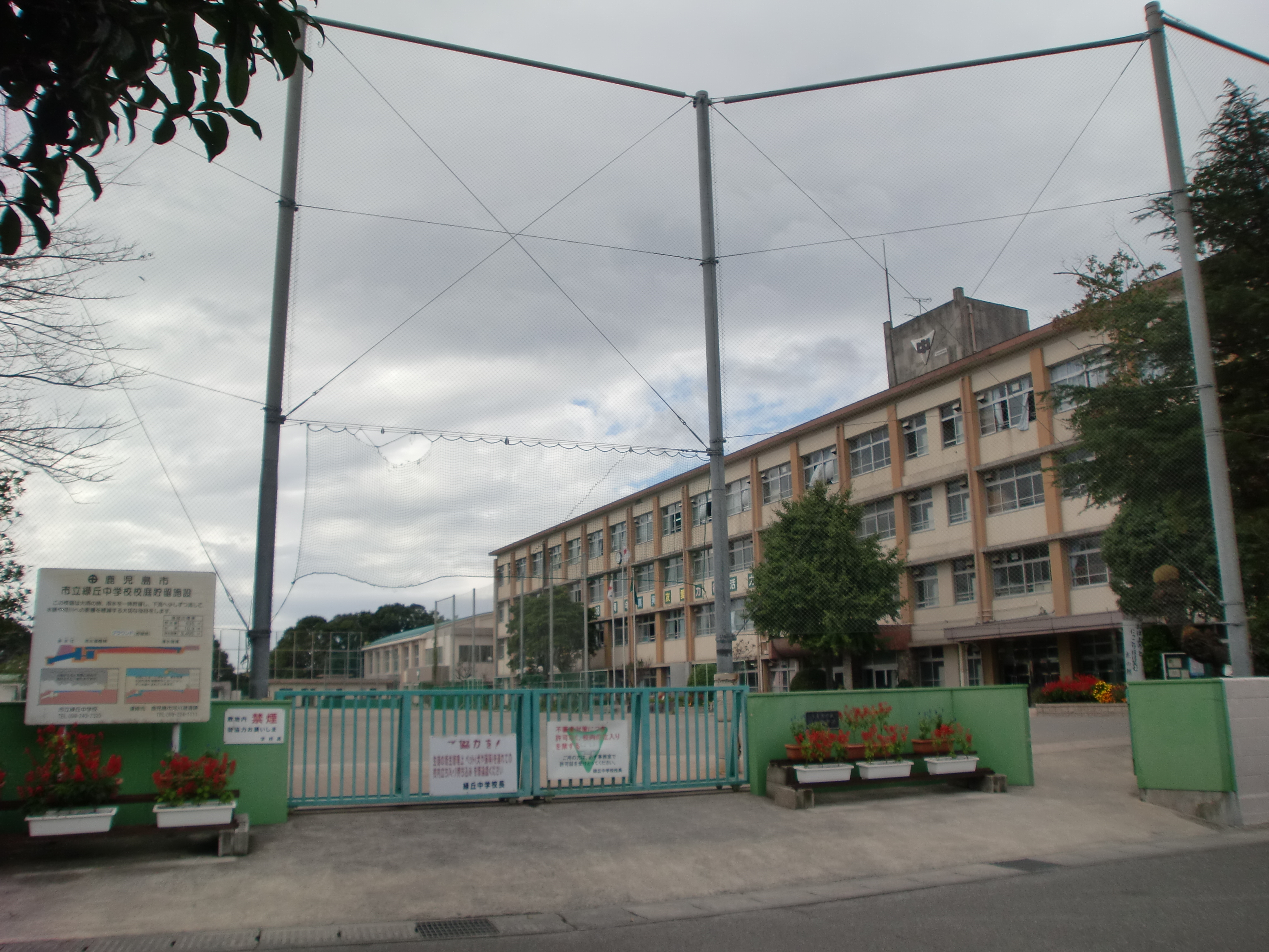 鹿児島市立緑丘中学校の外観。